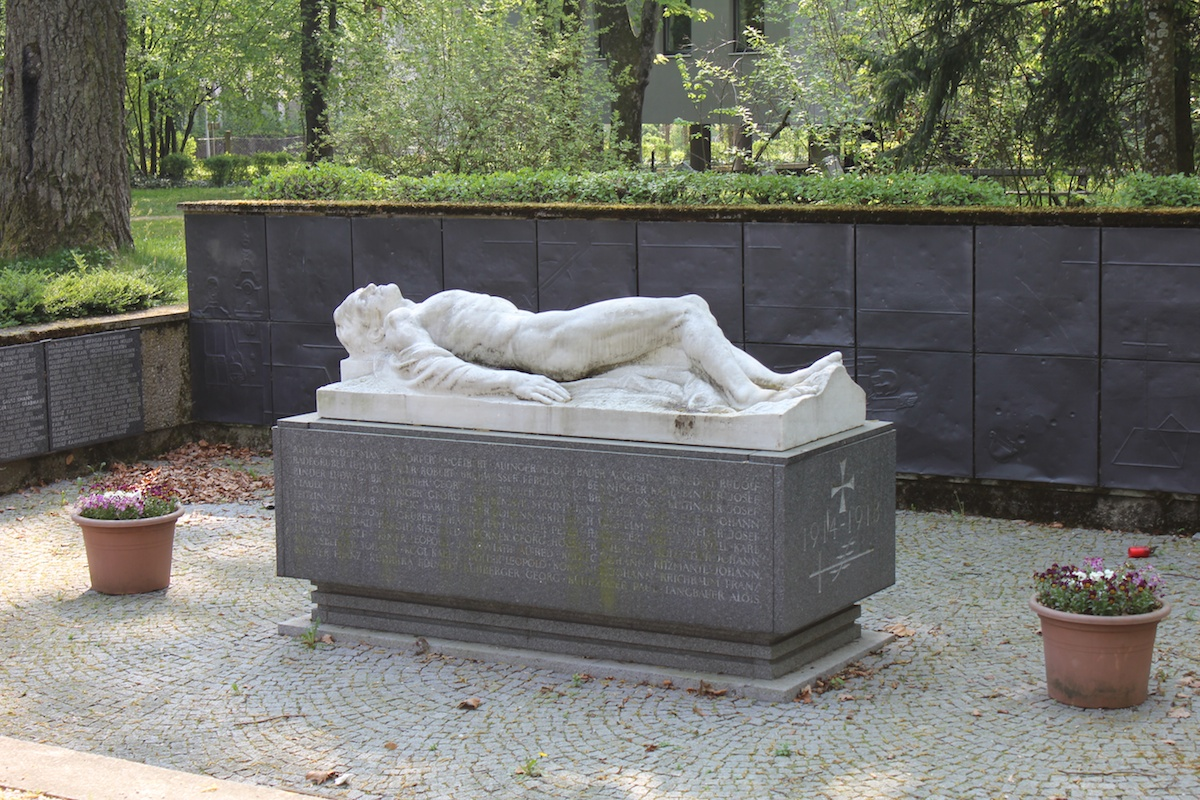 Kriegerdenkmal Ried im Innkreis